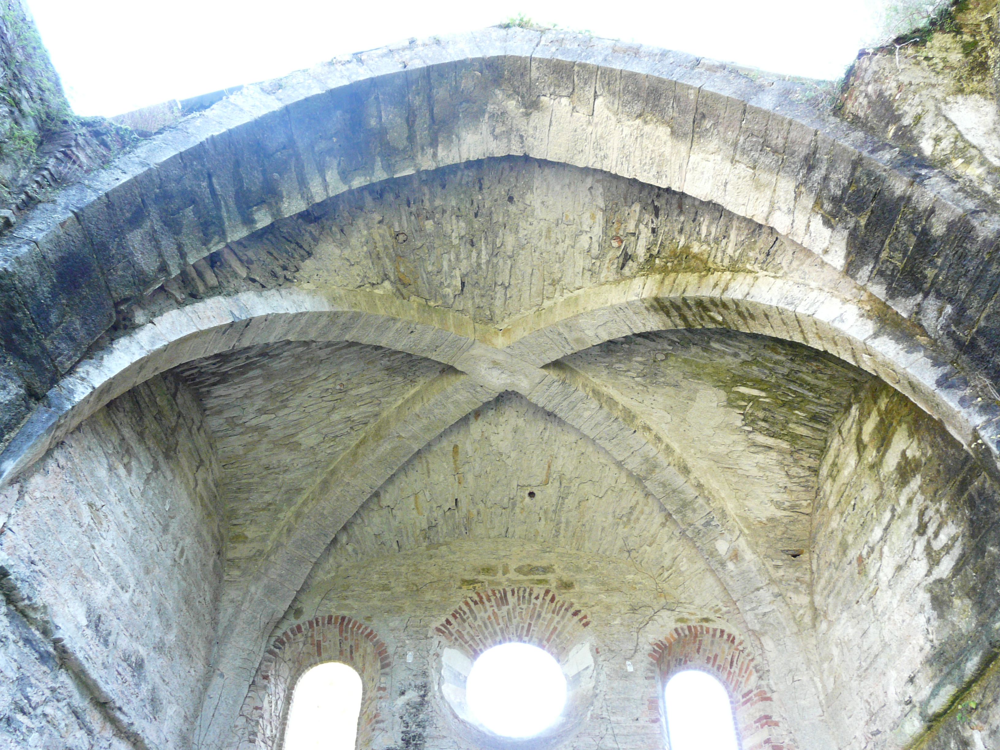 Ruderi dell'antico complesso monastico di Valle Christi del XIII secolo presso Rapallo, Liguria, Italia